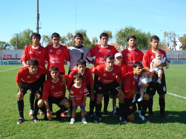 Formación del Club Atletico Barracas Bolivar